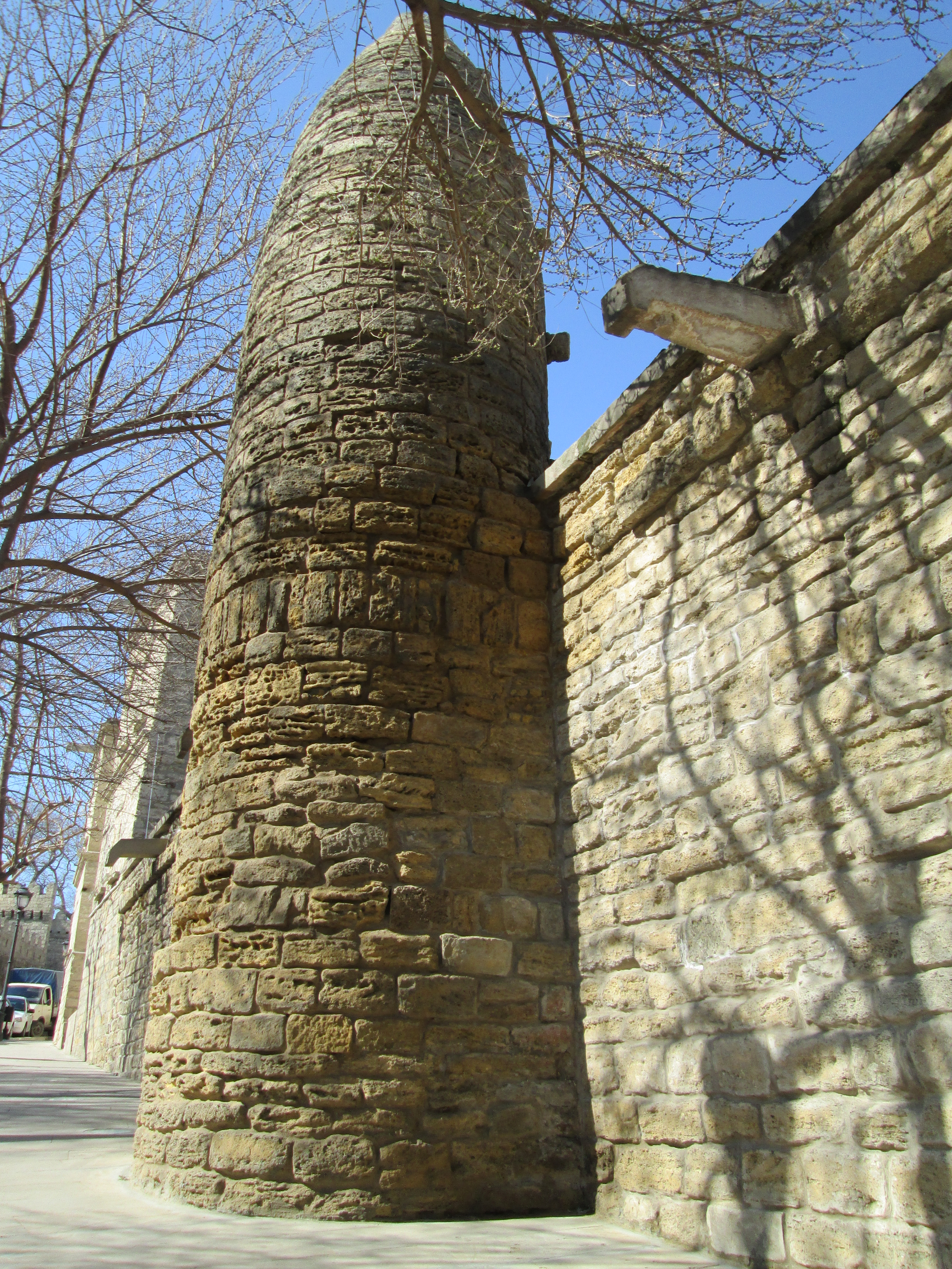 Ağa Mikayıl hamamının tüstü bacası